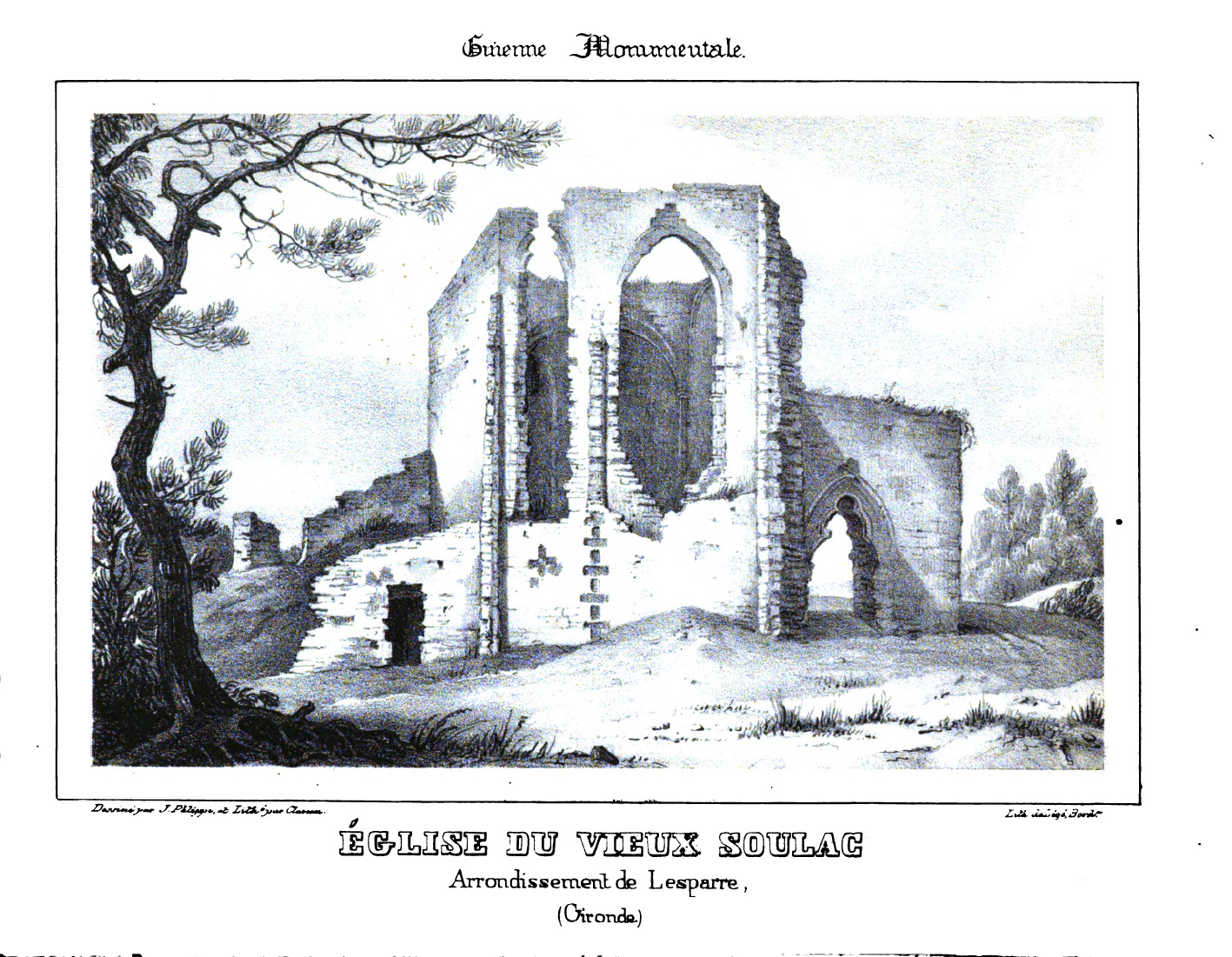 Eglise du vieux Soulac